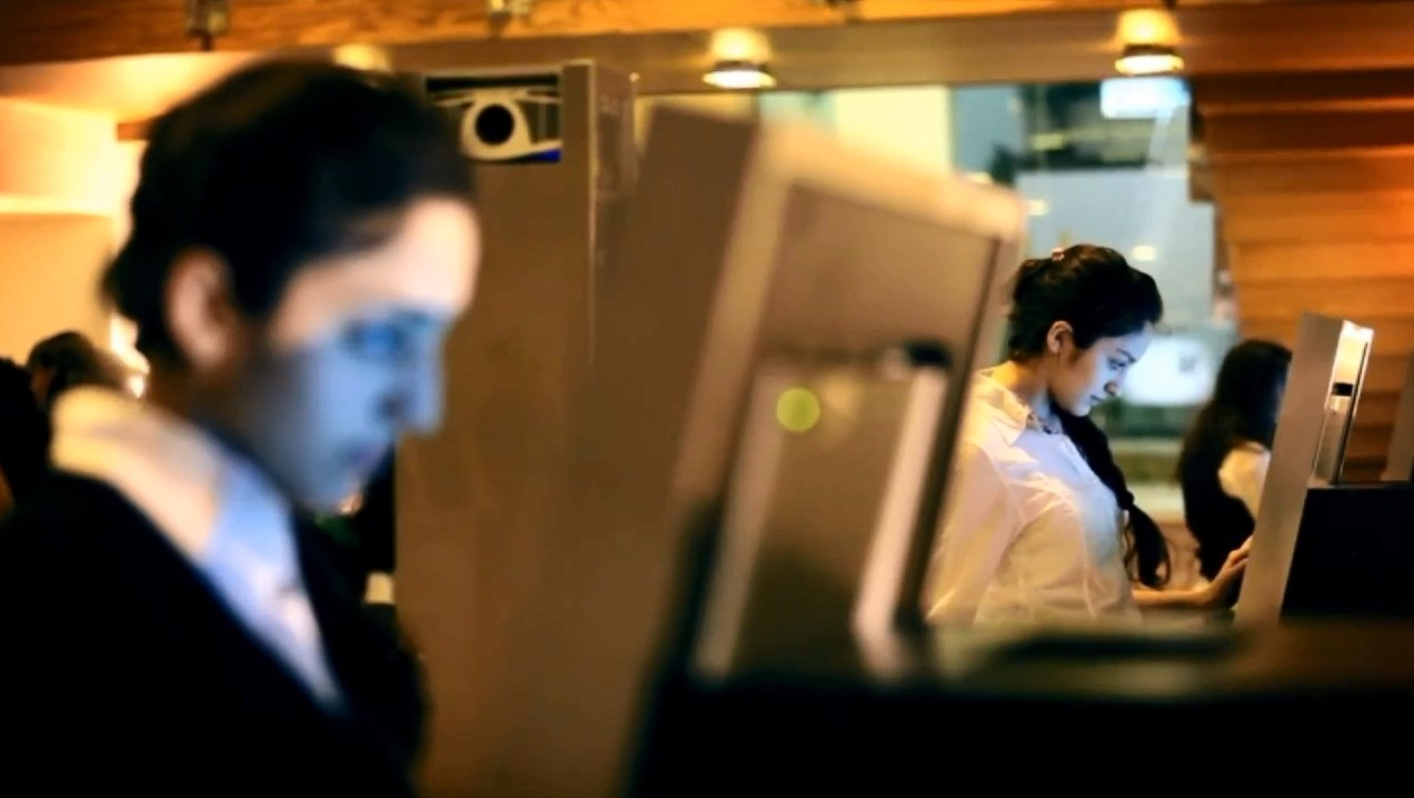 Այցելունների կենտրոն